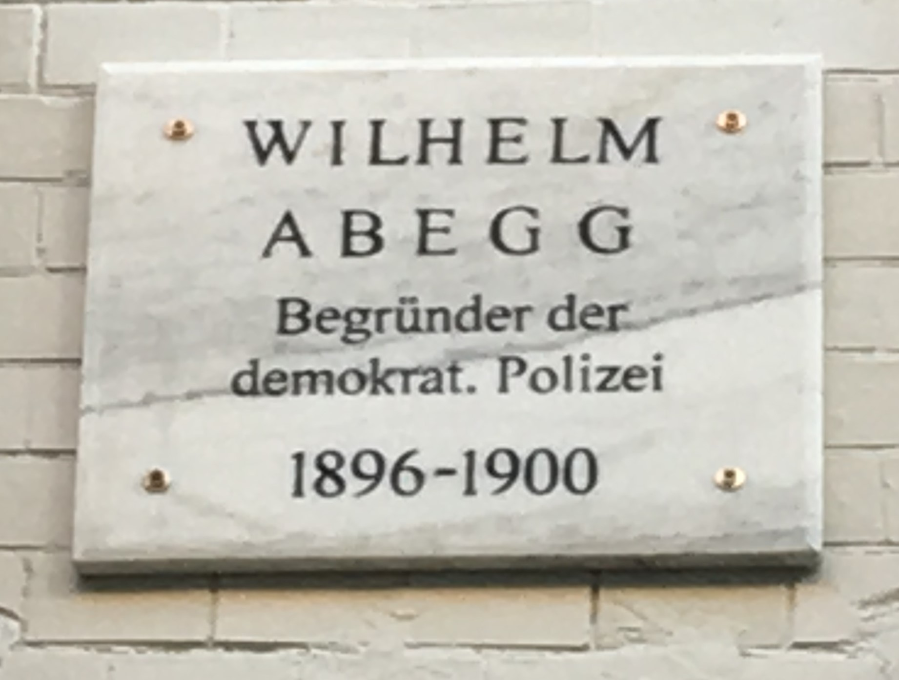 Göttinger Gedenktafel in der Theaterstraße für den preußischen Staatssekretär Wilhelm Abegg, der die Polizei modernisierte (Theaterstraße 2).